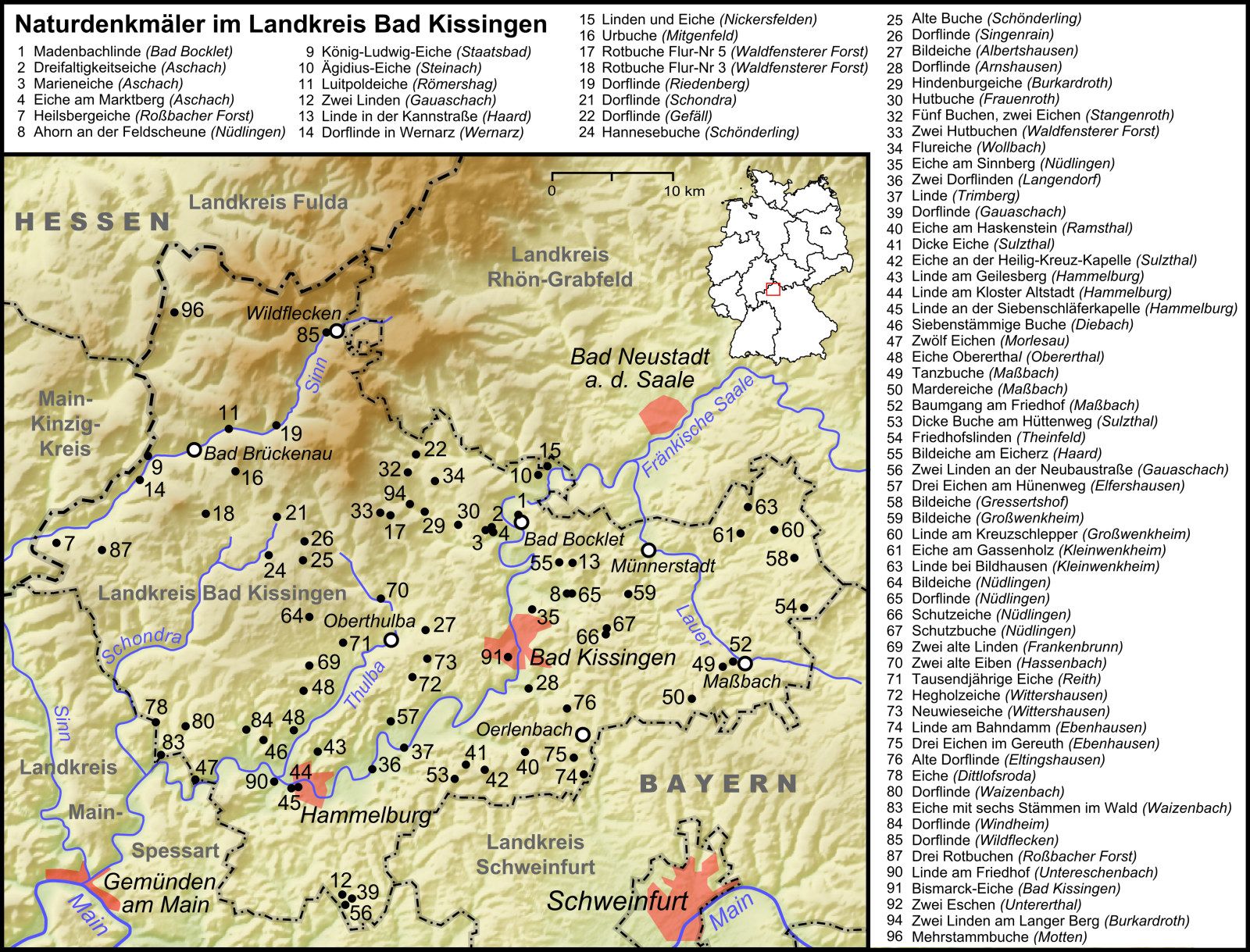 Karte der Naturdenkmäler im Landkreis Bad Kissingen. Nummerierung entsprechend der Liste der Naturdenkmäler im Landkreis Bad Kissingen